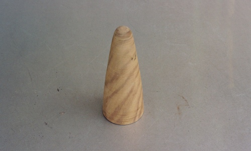 pieu en bois utilisé par le style naturel